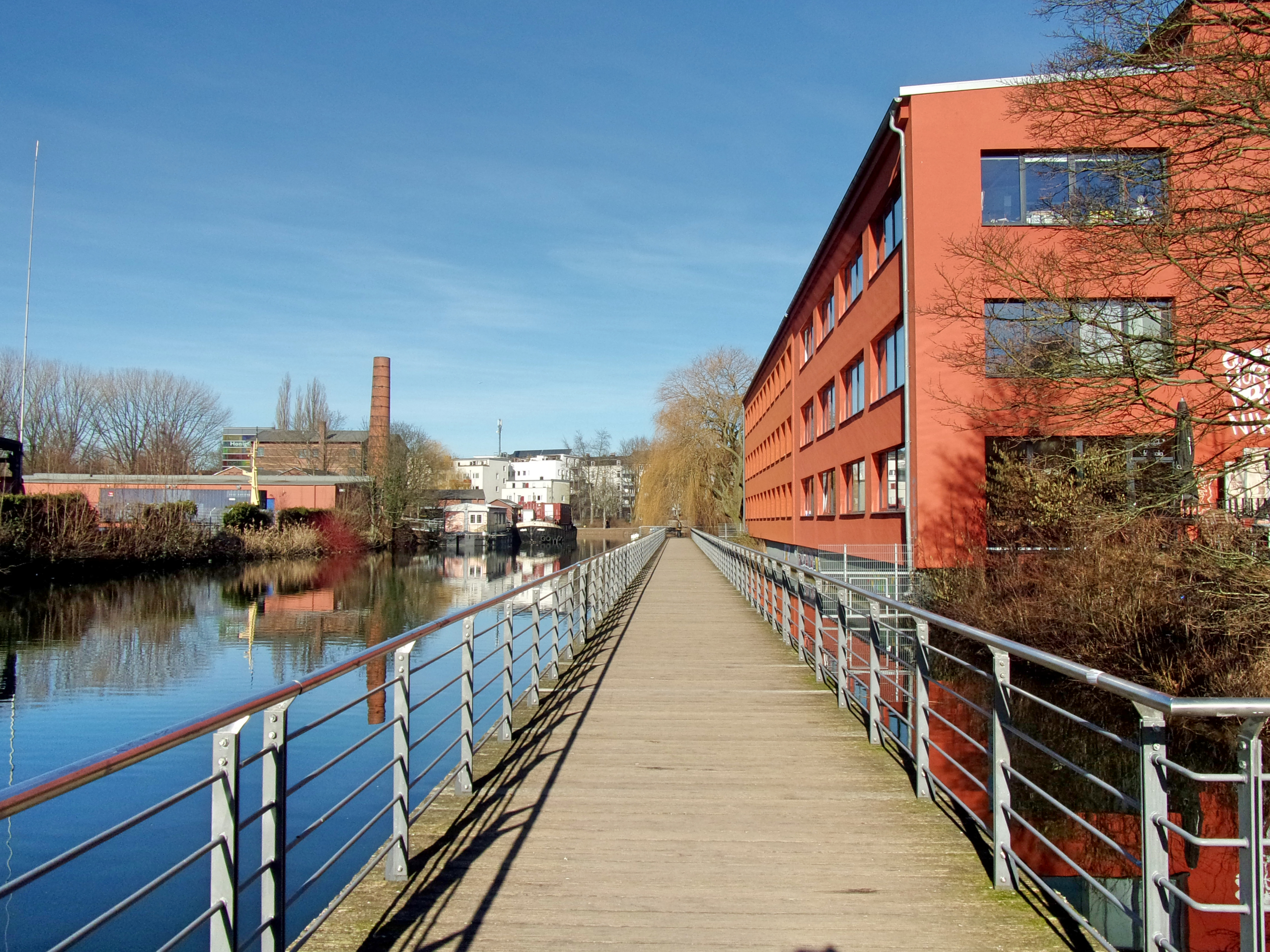 Steg am Veringkanal in nördliche Richtung, er führt direkt in den Sanitaspark am Ende des Kanals.